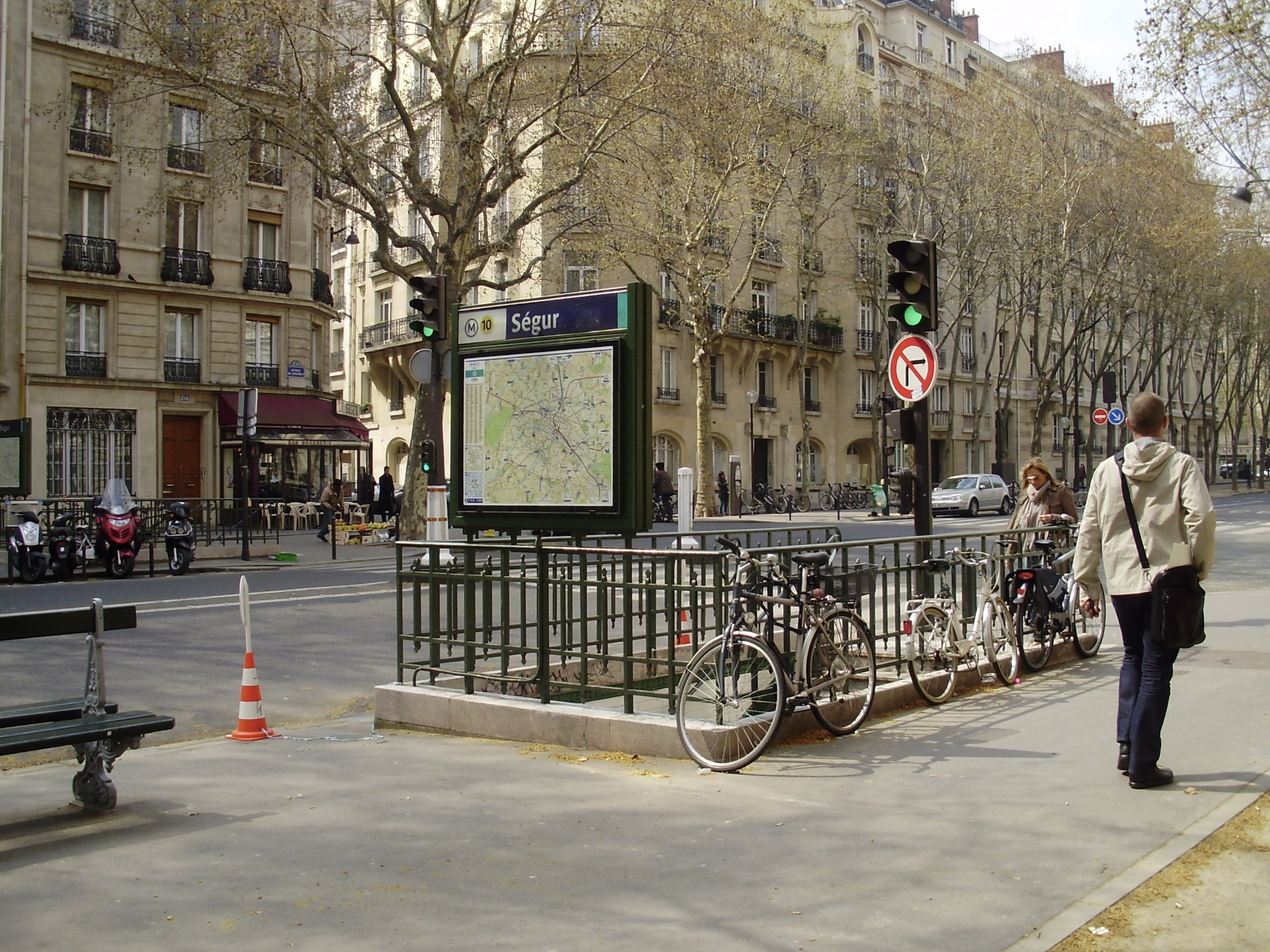 Entrée de la station Ségur du métro de Paris, Avenue de Suffren, XVe arrondissement, Paris, France.